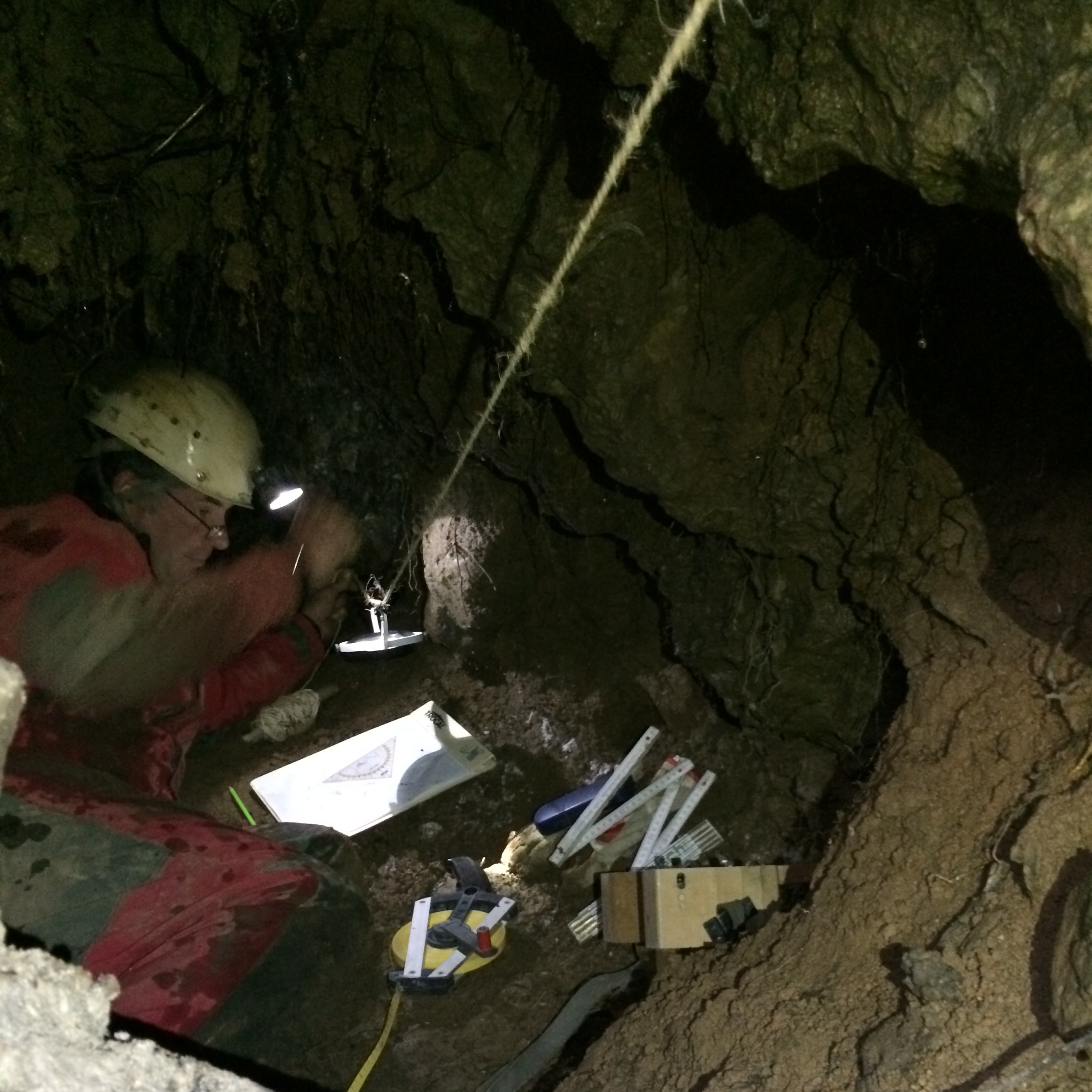 Höhlenforscher des Arbeitskreis Kluterthöhle bei der Vermessung mit Freiberger Hängezeug.